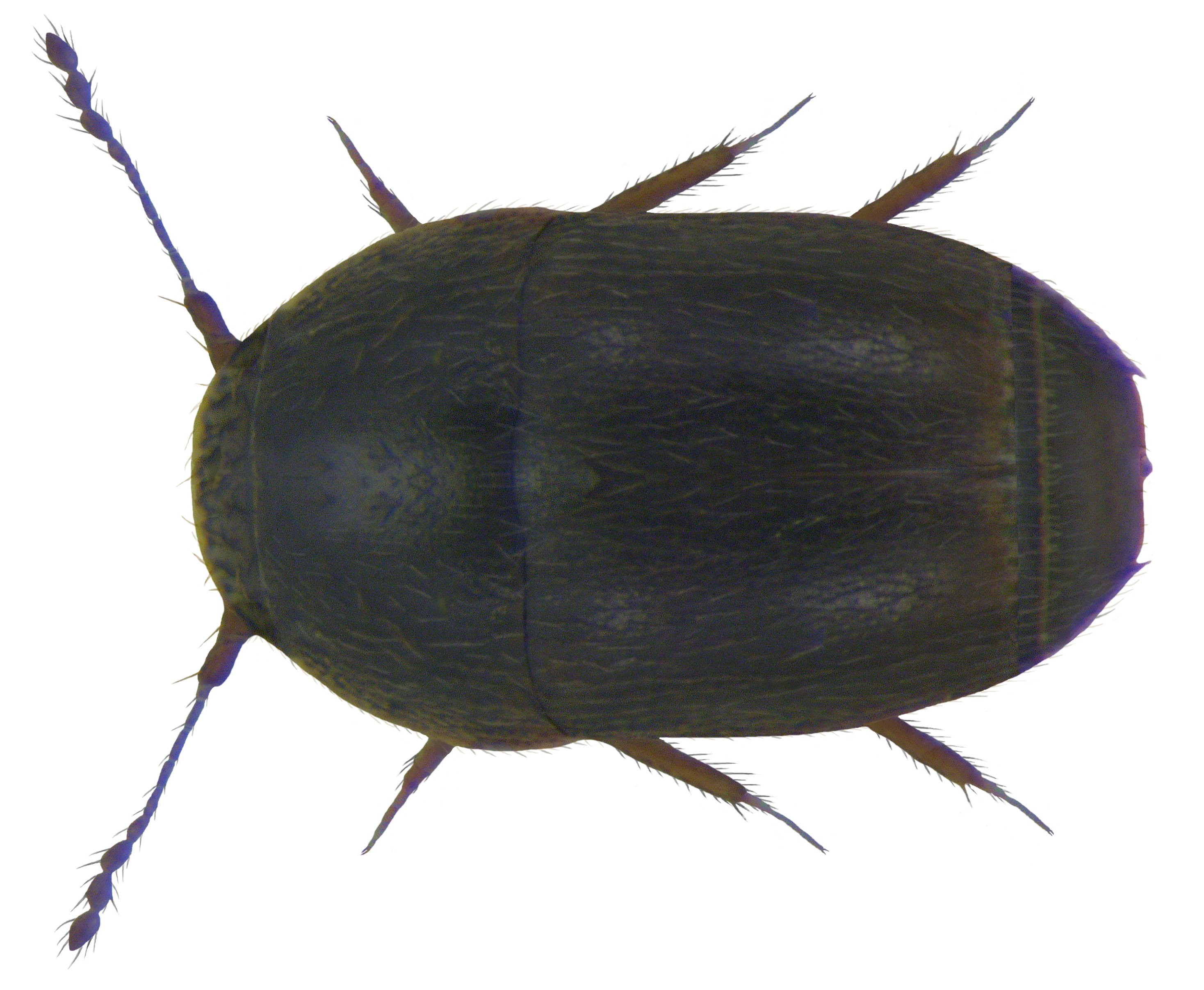 Familie: Ptiliidae Grösse: 1-1,1 mm Verbreitung: Europa Ökologie: in Kompost, Dung, Aas, unter Laub Fundort: Germania, Bayern, Oberfranken, Selbitz leg.det. U.Schmidt, 2000 Foto: U.Schmidt, 2009